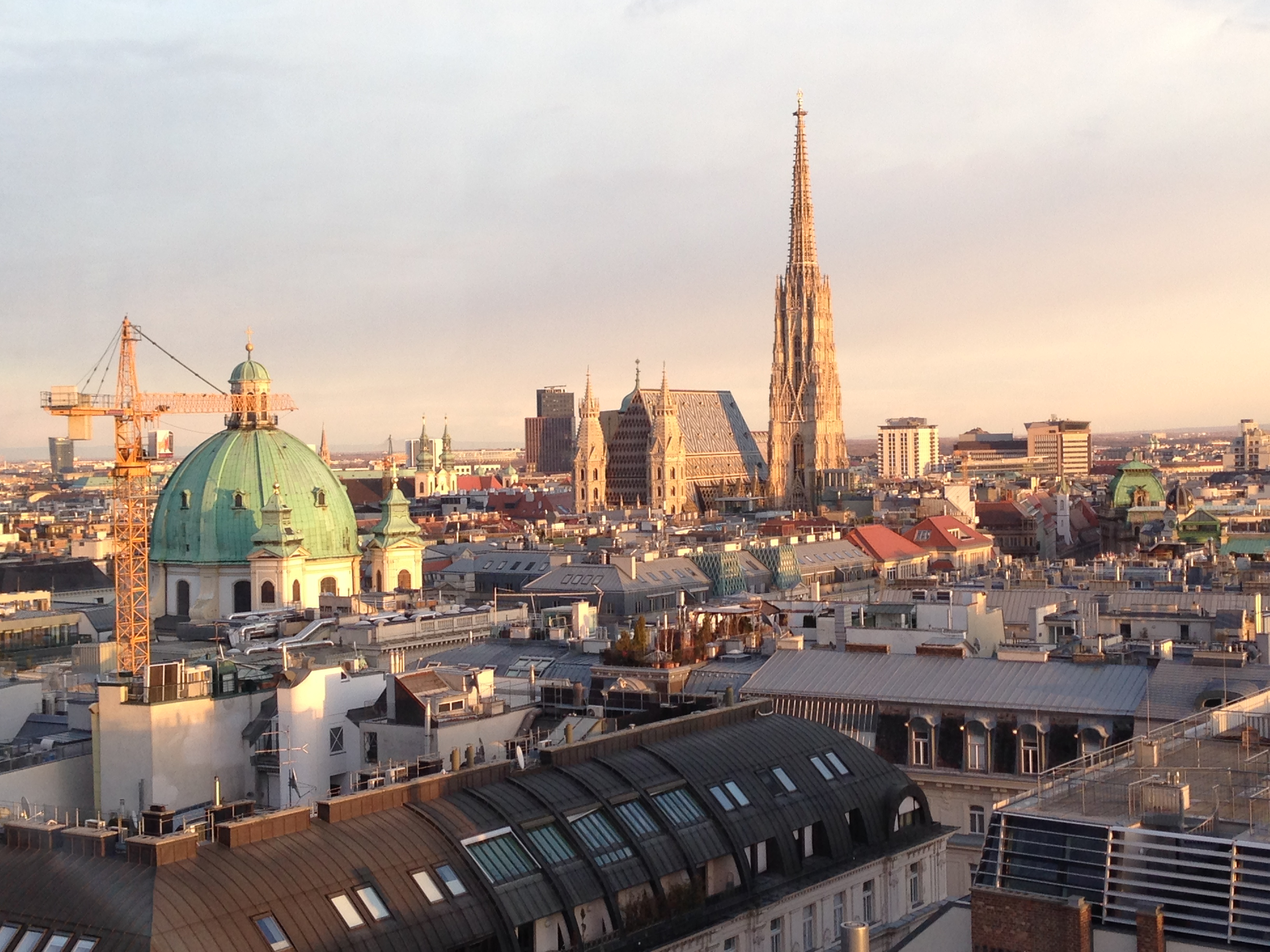 St Stephans Vienna from Hoch Haus - 5